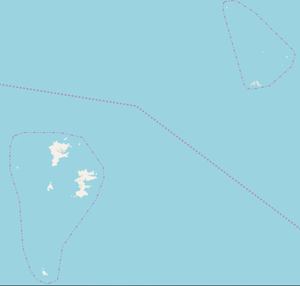 七星列岛区域地图。中央的省界按照实际控制的习惯线绘制。